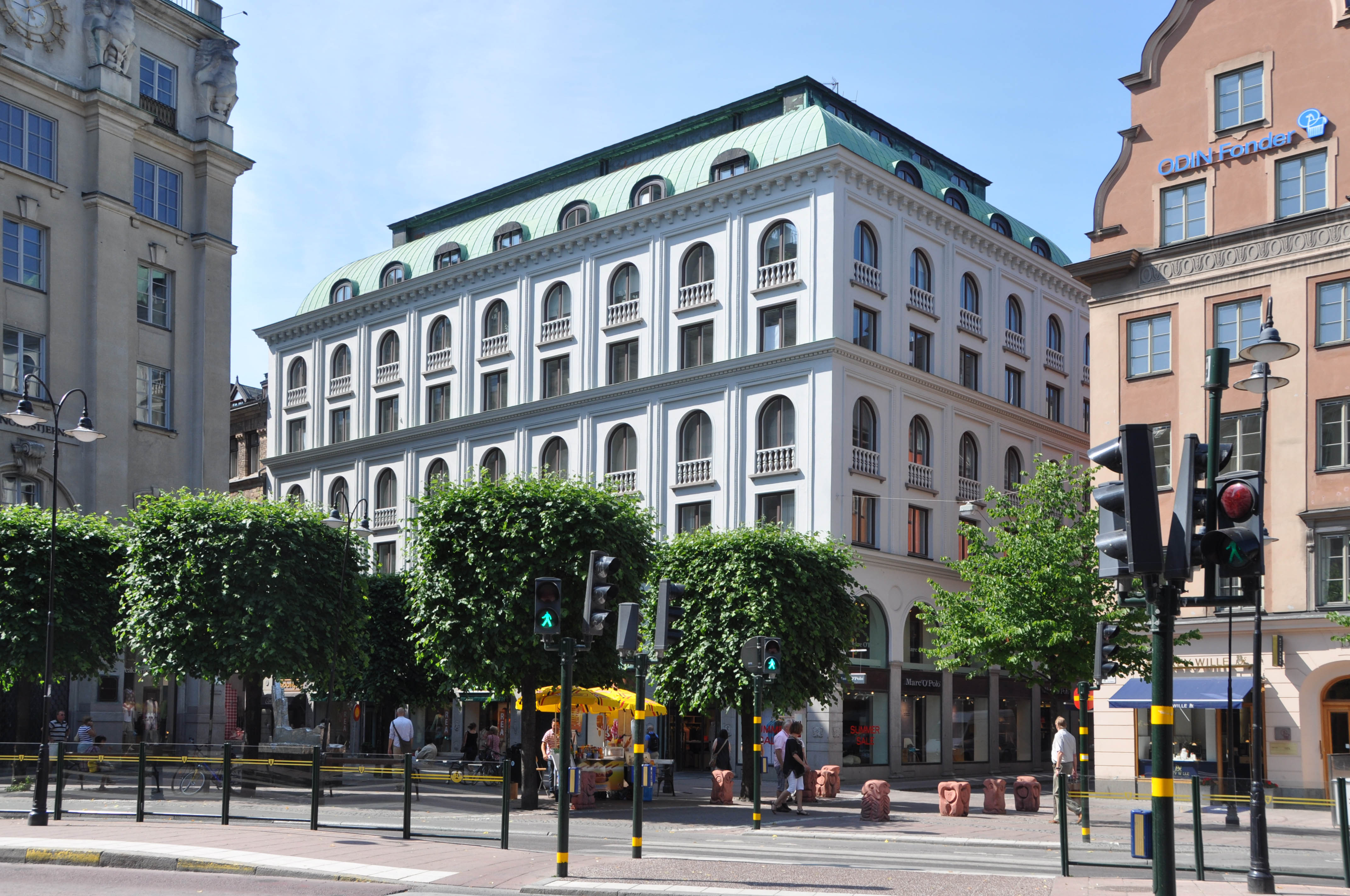 Sturepalatset, Biblioteksgatan 11 Stockholm